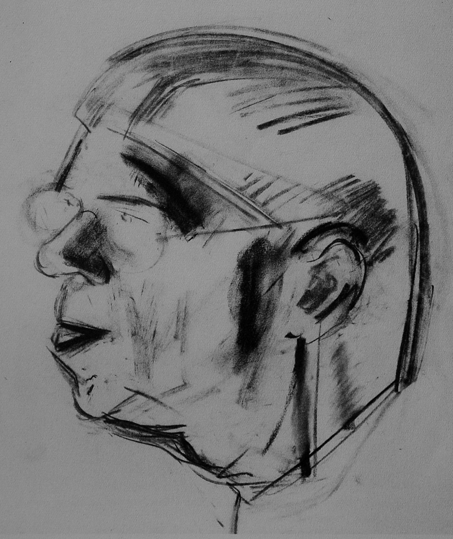 Johan Johansson. Karikatyrteckning av konstnärsvänner utförd av konstnären John Jon-And, utgiven postumt efter hans död 1941 i boken Konstnärer Gebers Förlag.